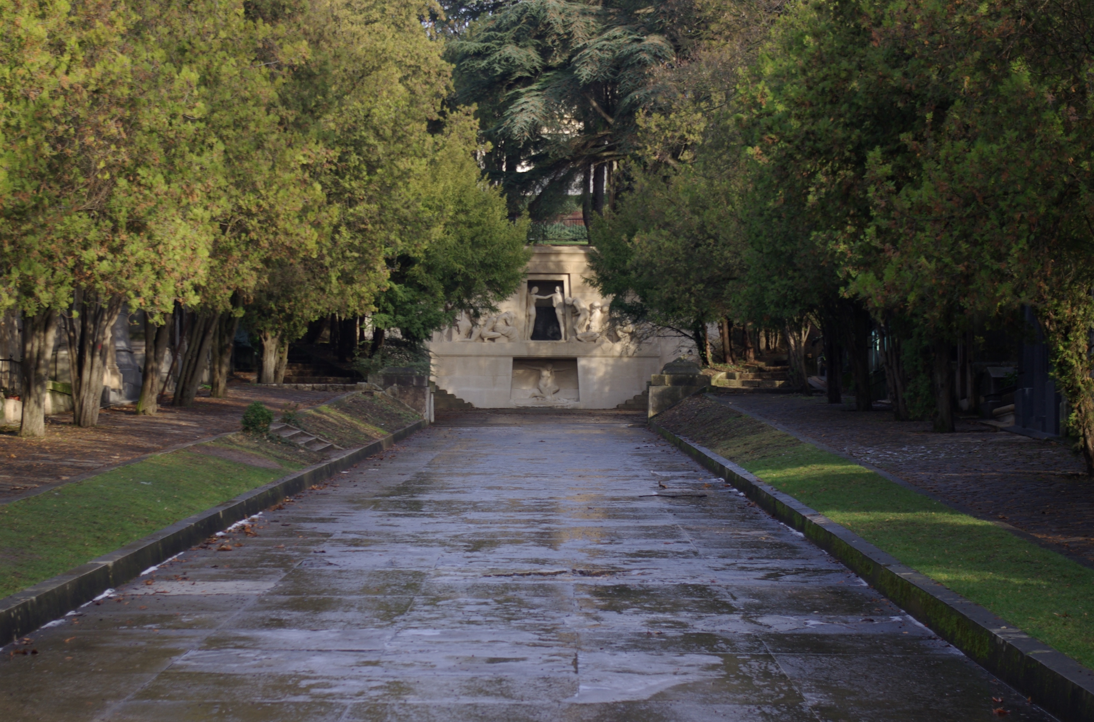 Denkmal Aux Morts (1899) von Albert Bartholomé auf dem Friedhof Père Lachaise in Paris